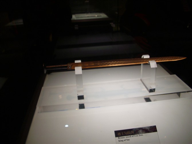 2009年10月8日摄于湖北省博物馆